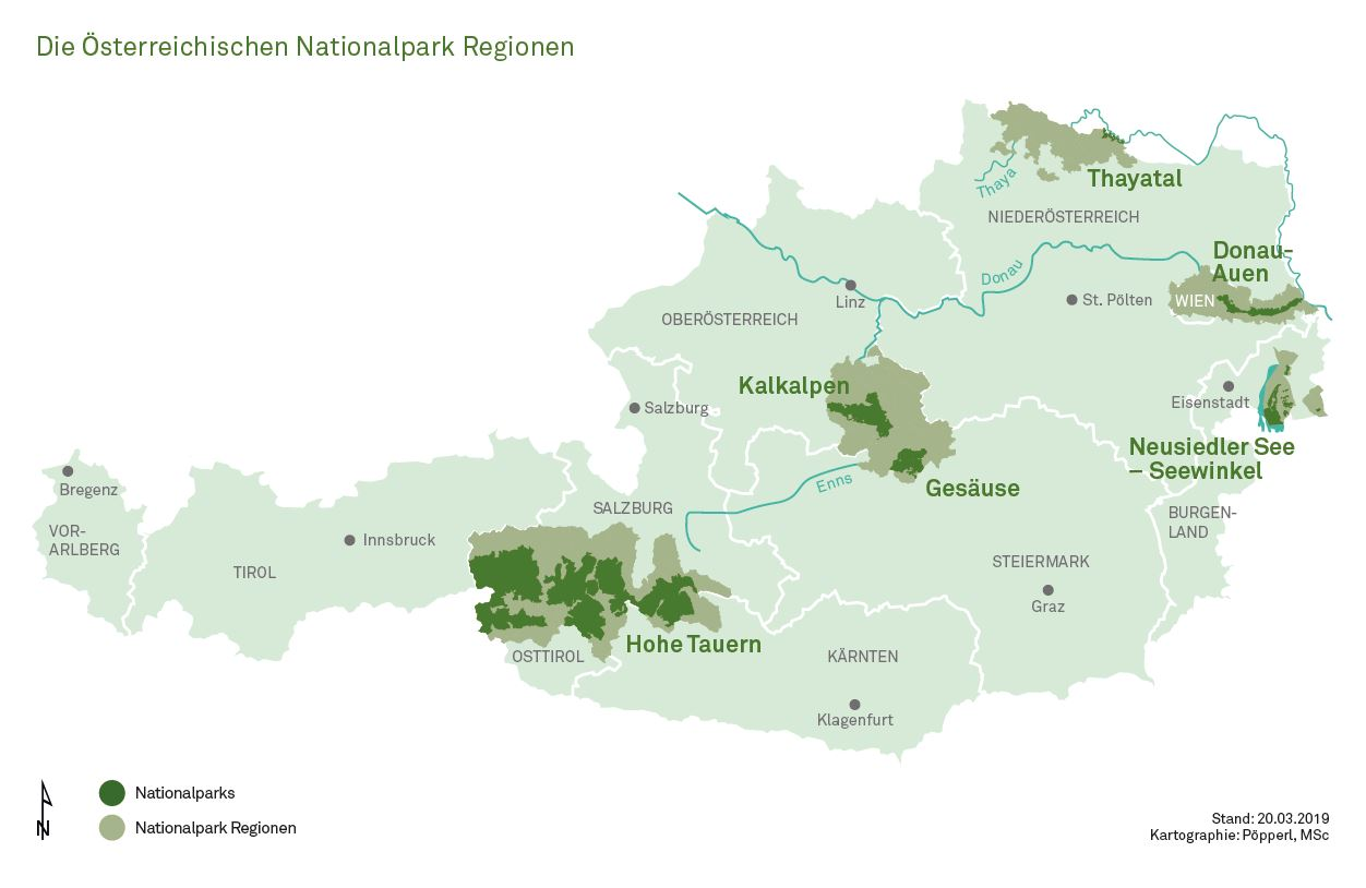 Karte Nationalparks in Österreich und Nationalpark-Regionen